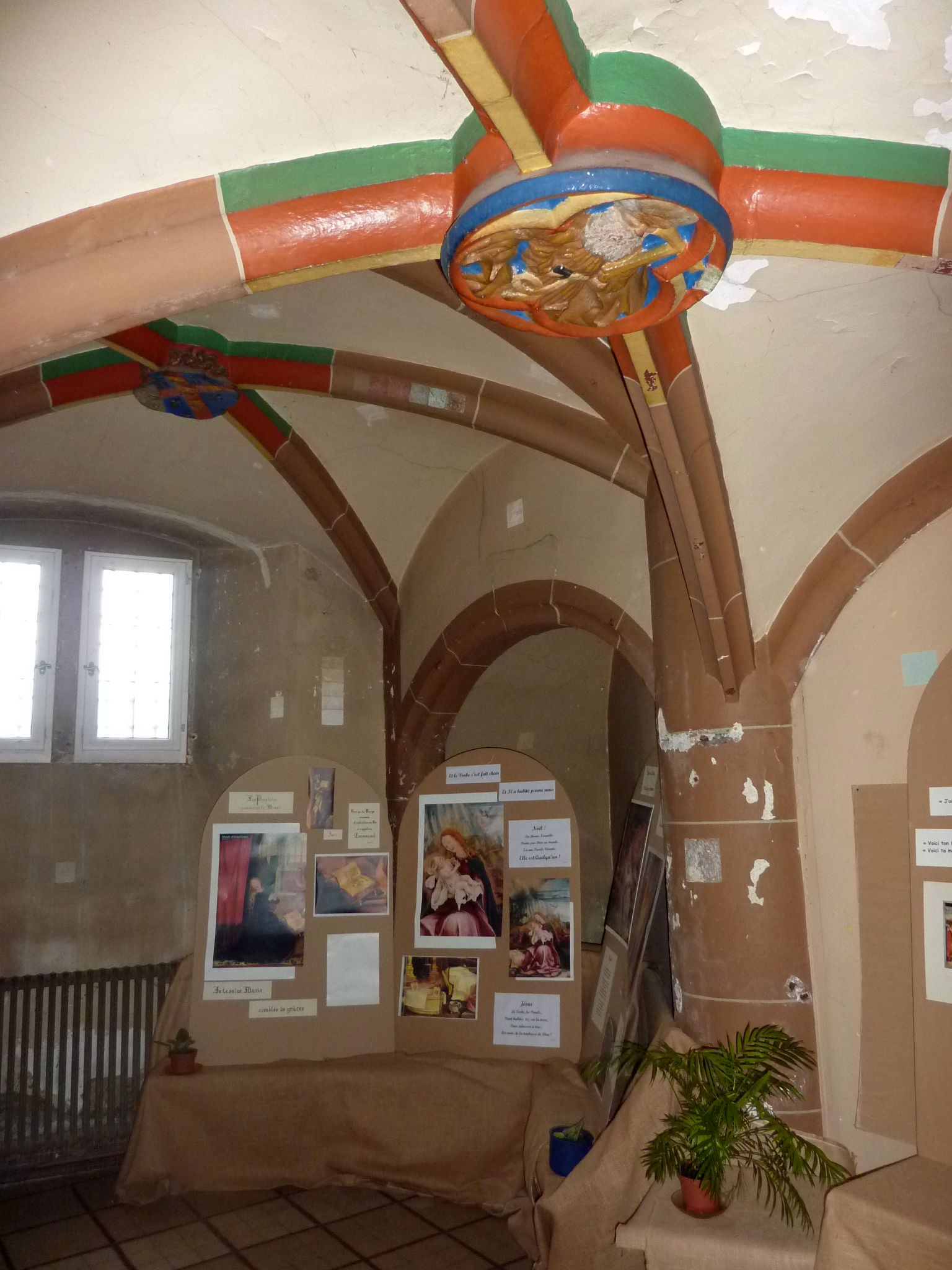 Préceptorerie des Antonins (Issenheim)